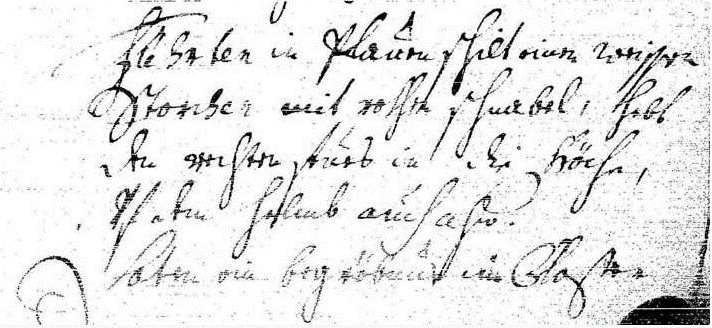 Aus der genealogischen Sammlung von Johann von Prey (1740). Band 24. Seiten 202 ff.